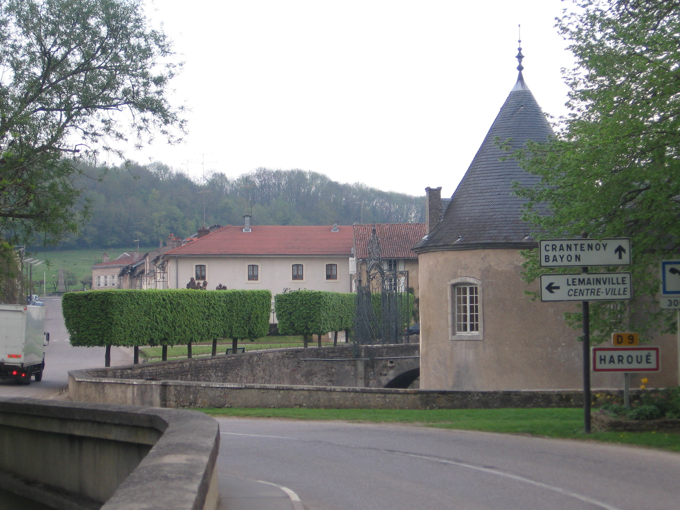 Haroué, may 2006